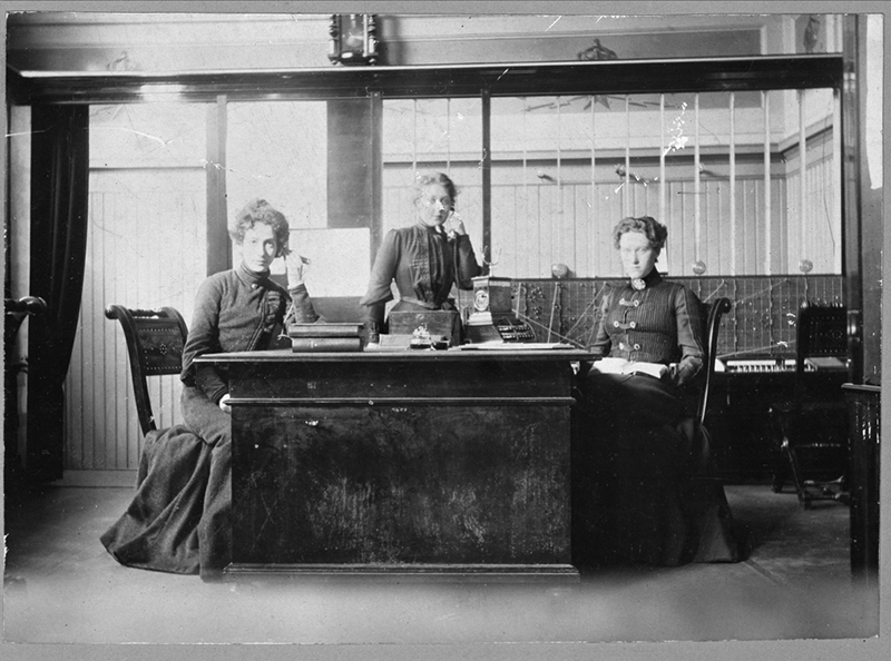 Telefonister, Stockholms telefonsstation.